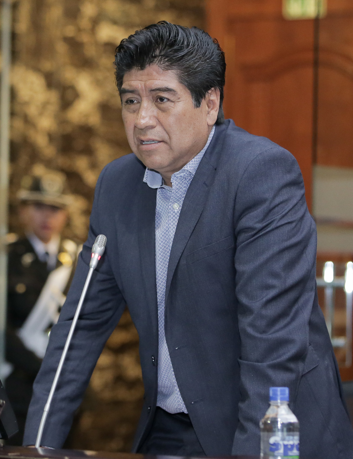 jorge yunda